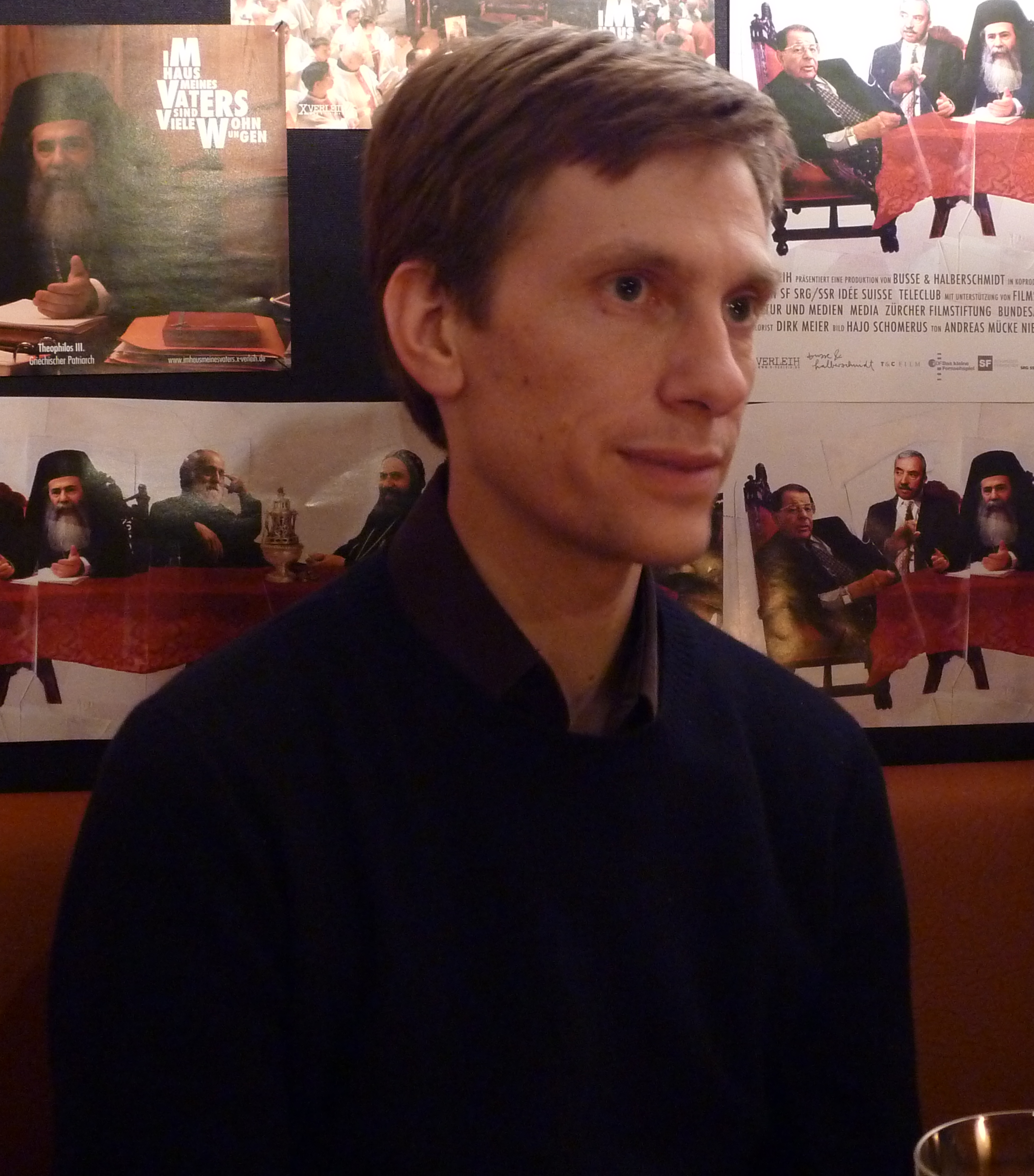 Benjamin Heisenberg im "Cinema Münster" im Rahmen der Premiere seines Films "Der Räuber"